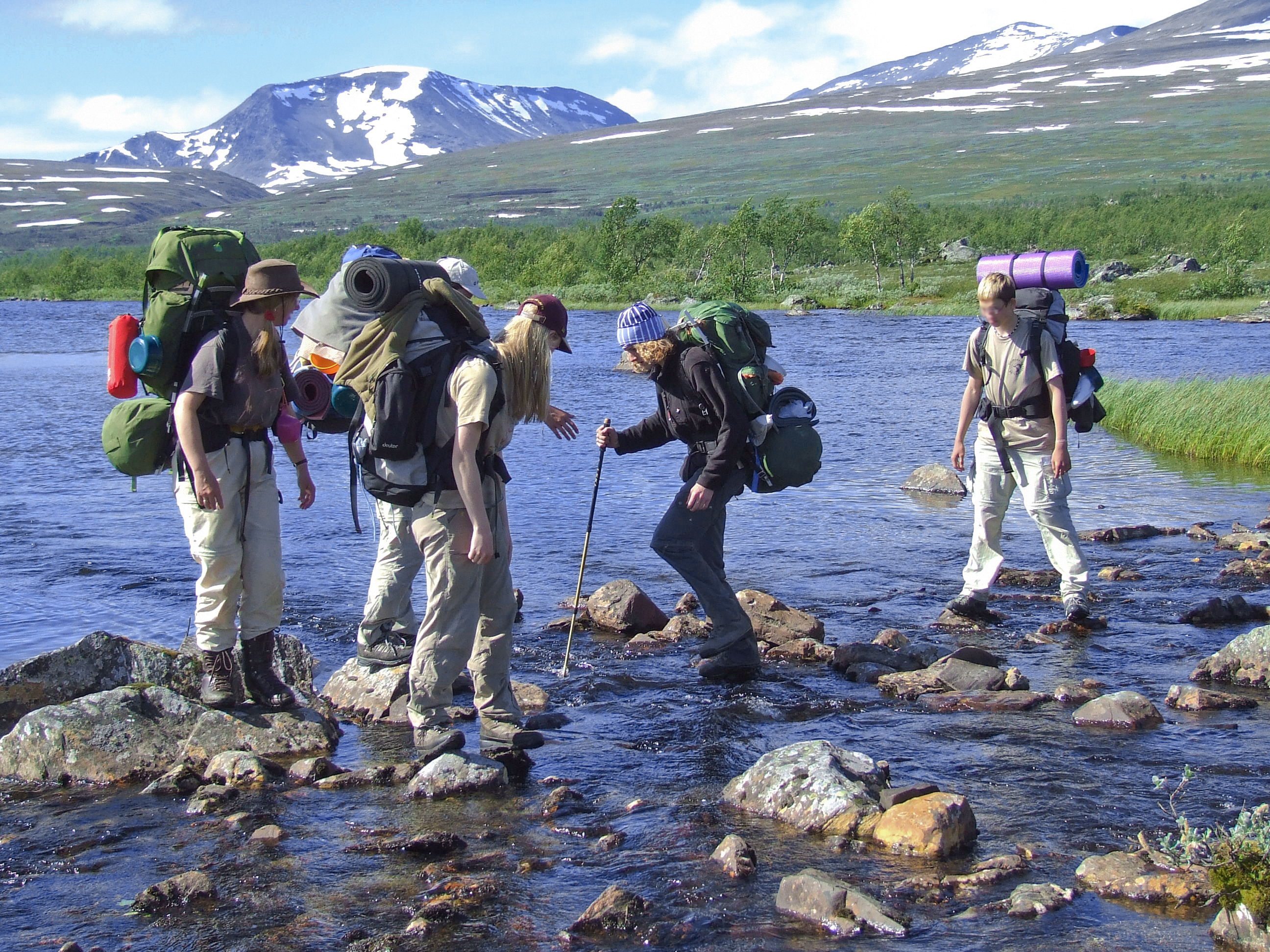 Flussüberquerung im südlichen Sarek-Nationalpark (Pårekslätten)